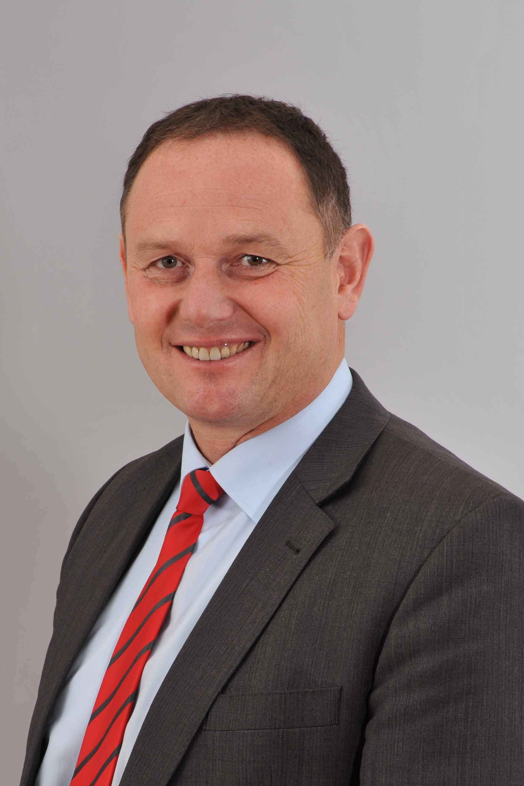 Landtagsprojekt Salzburg: Peter Pfeifenberger